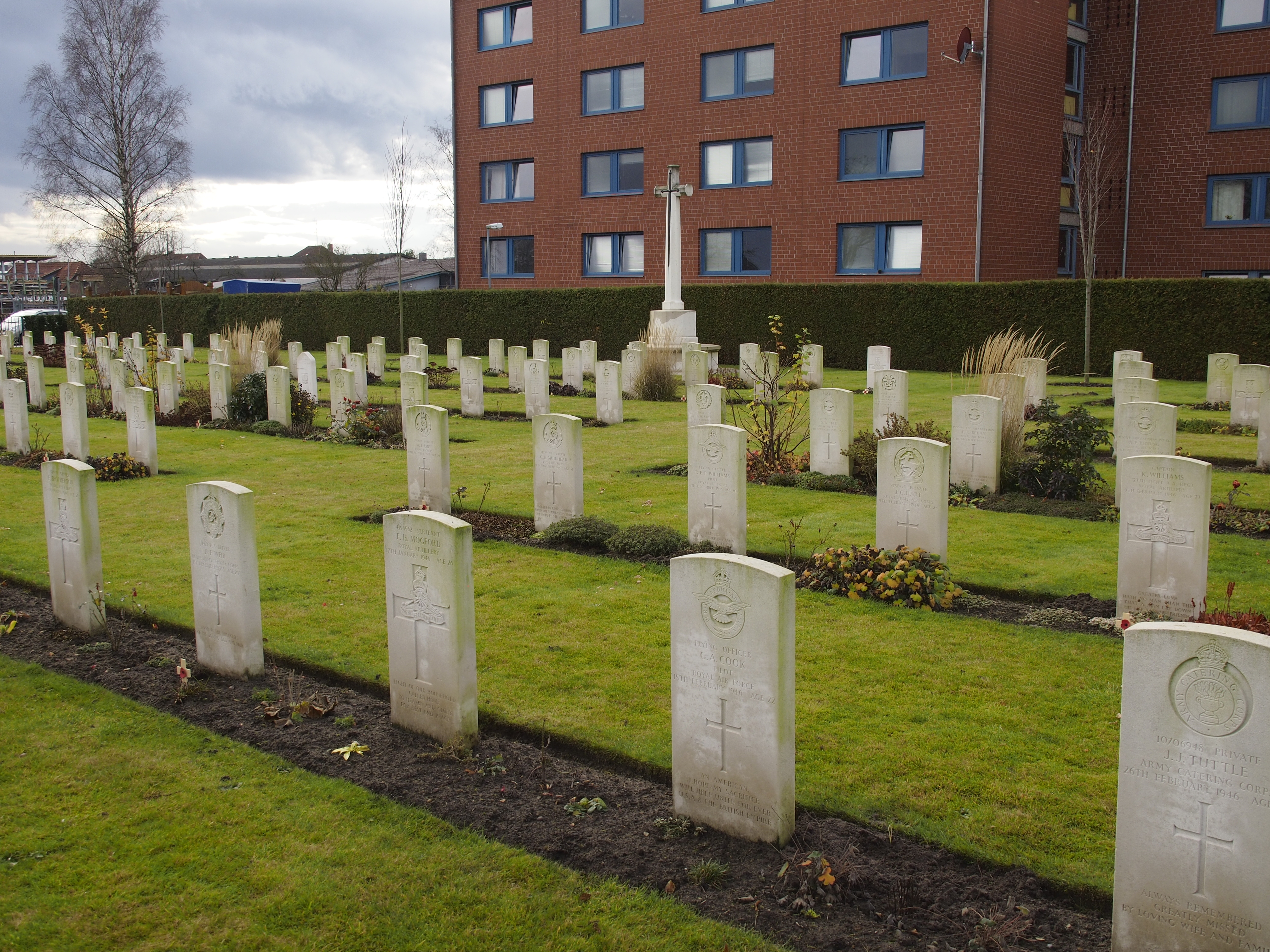 Celle War Cemetery, Niedersachsen, Germany